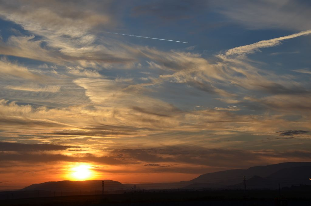 Pohľad do Turnianskej kotliny zovretej medzi masívy vápencových planín. Vľavo planina Alsó-hegy/Dolný vrch, vpravo Horný vrch a Zádielska planina, v pozadí Silická planina (Silické úbočie)) z Košickej roviny v Košickej kotline.